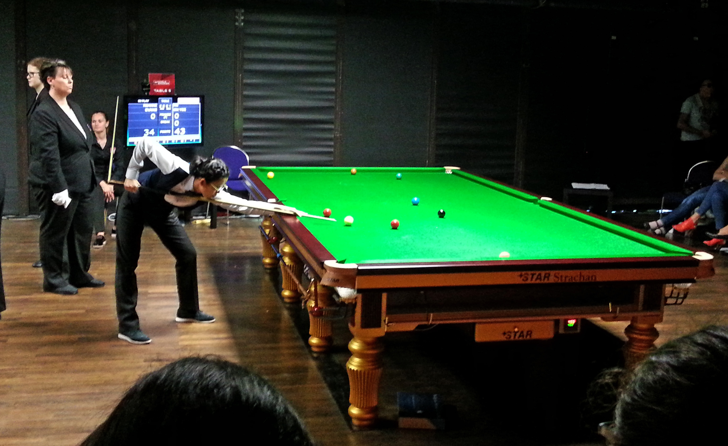 Das Finale des Paul Hunter Ladies Classic 2016, am 28. August 2016, in der Stadthalle in Fürth. Ng On Yee am Tisch. Schiedrichterin Kim Ivett, links und Gegnerin Reanne Evans im Hintergrund sitzend.